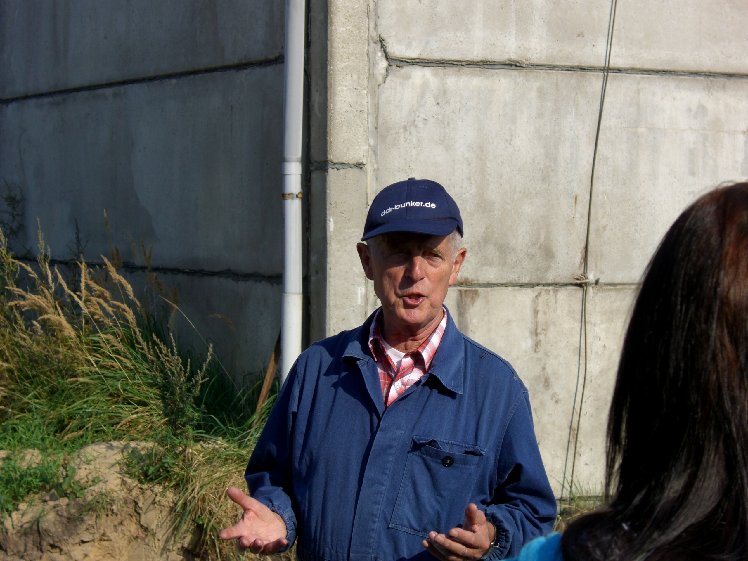 Paul Bergner bei einer Bunkerführung (Objekt 17/5005) in der Nähe von Biesenthal